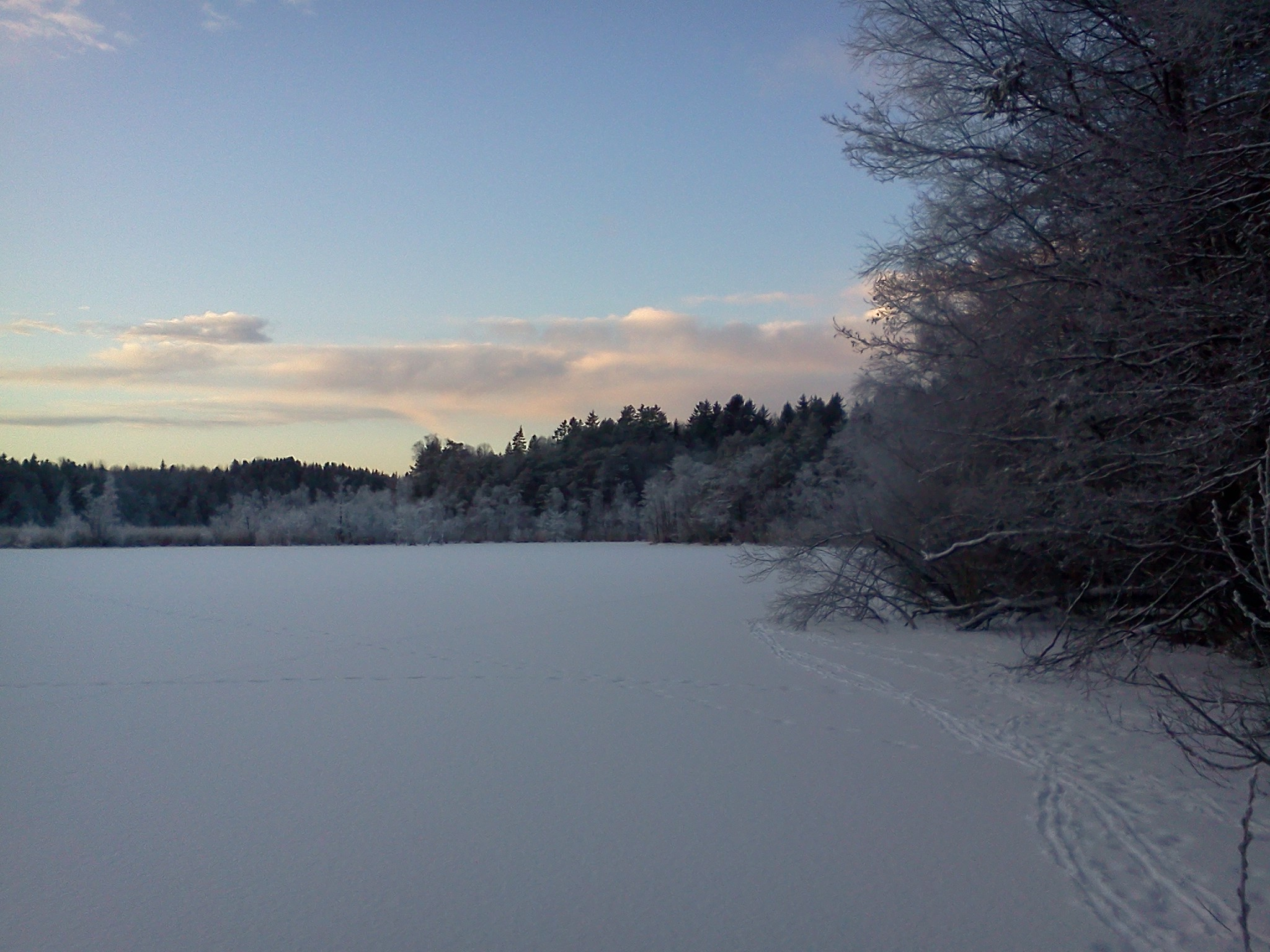 Nesøytjern en vinterdag i 2012.